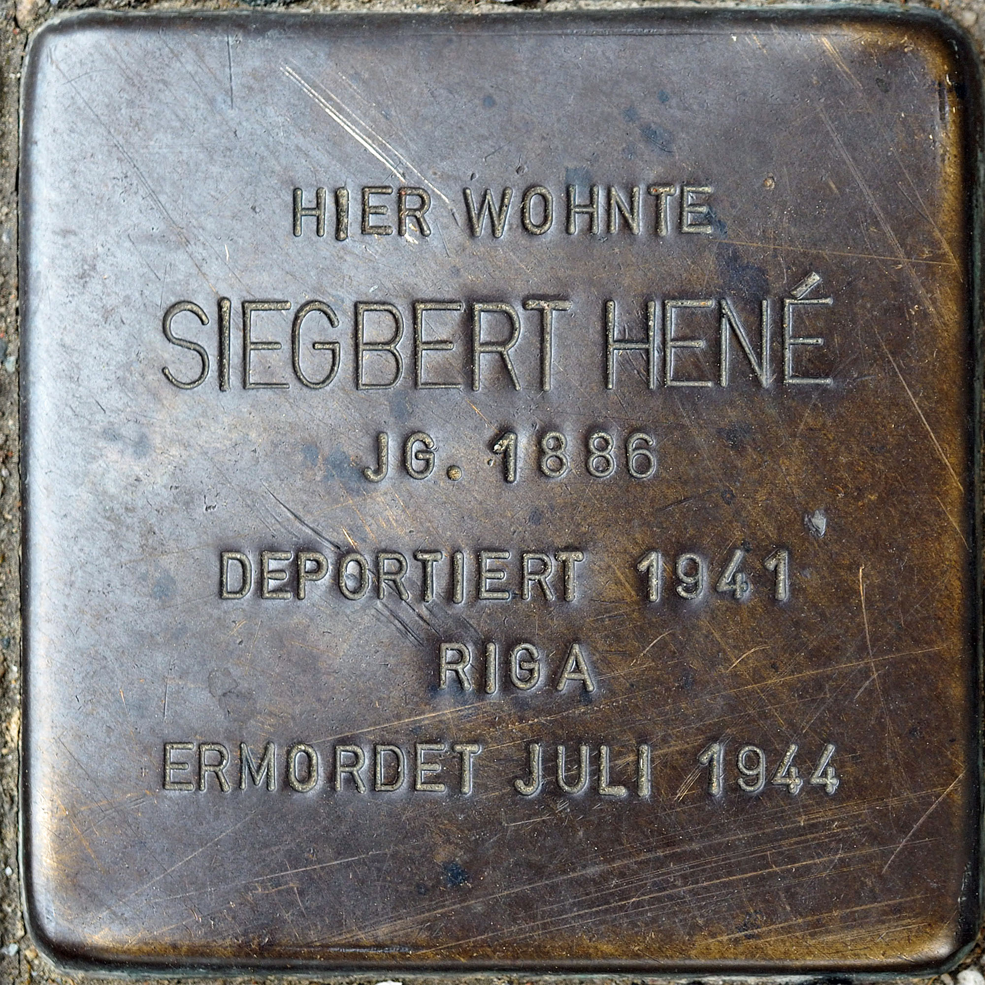 Stolpersteine MG: Hene, Siegbert